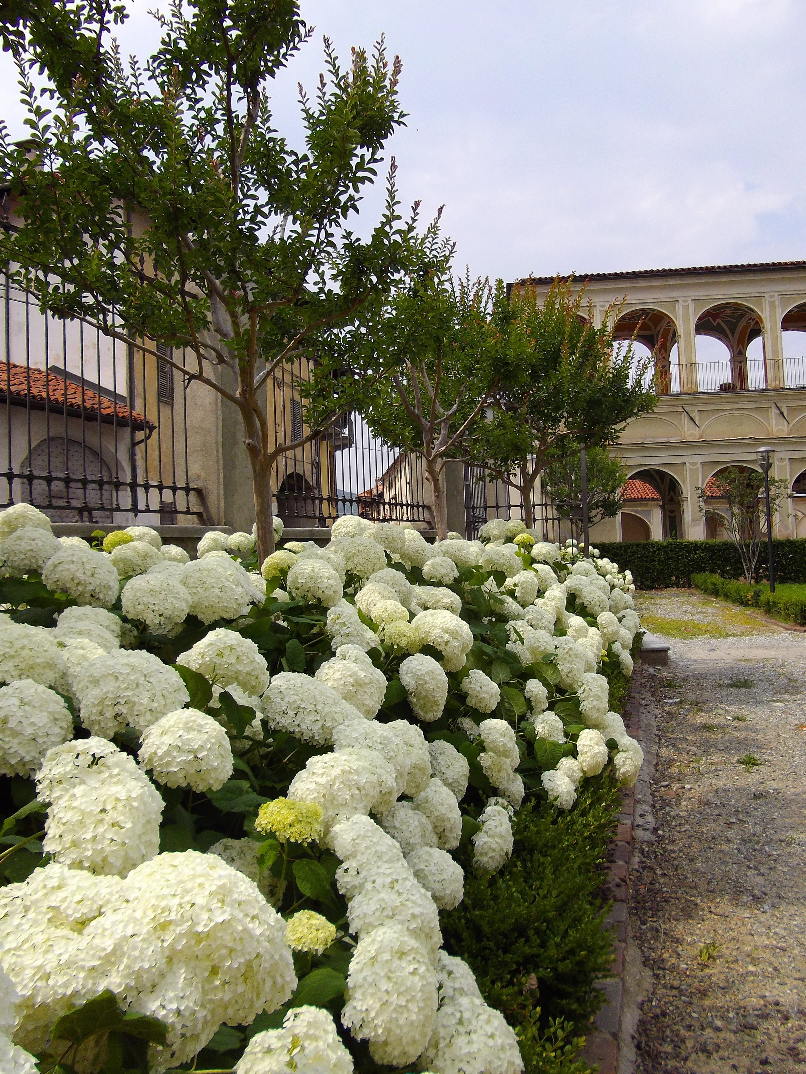 Piemontèis: Palas La Tour